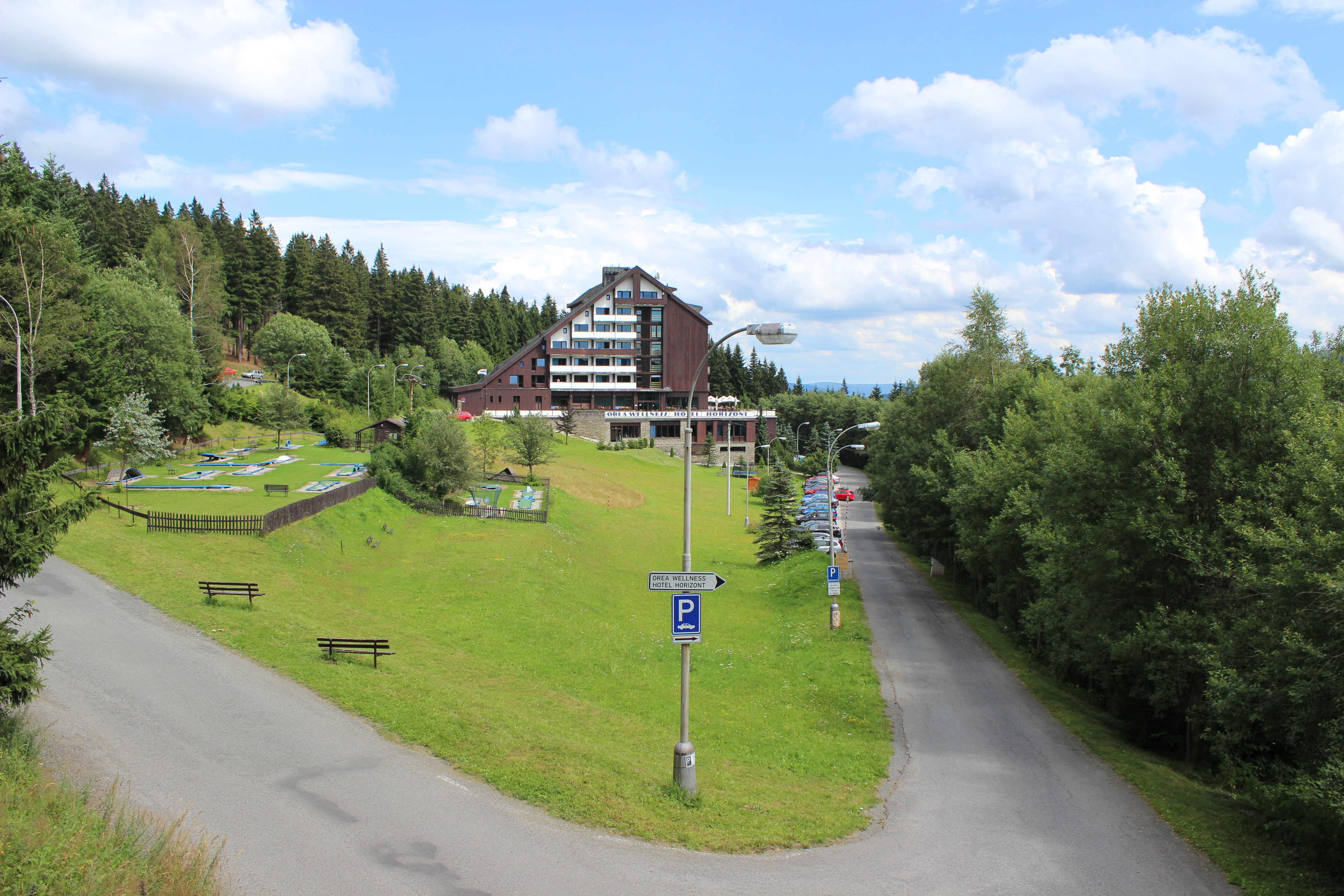 Hotel na Hofmankách na Pancíři, části Železné Rudy.